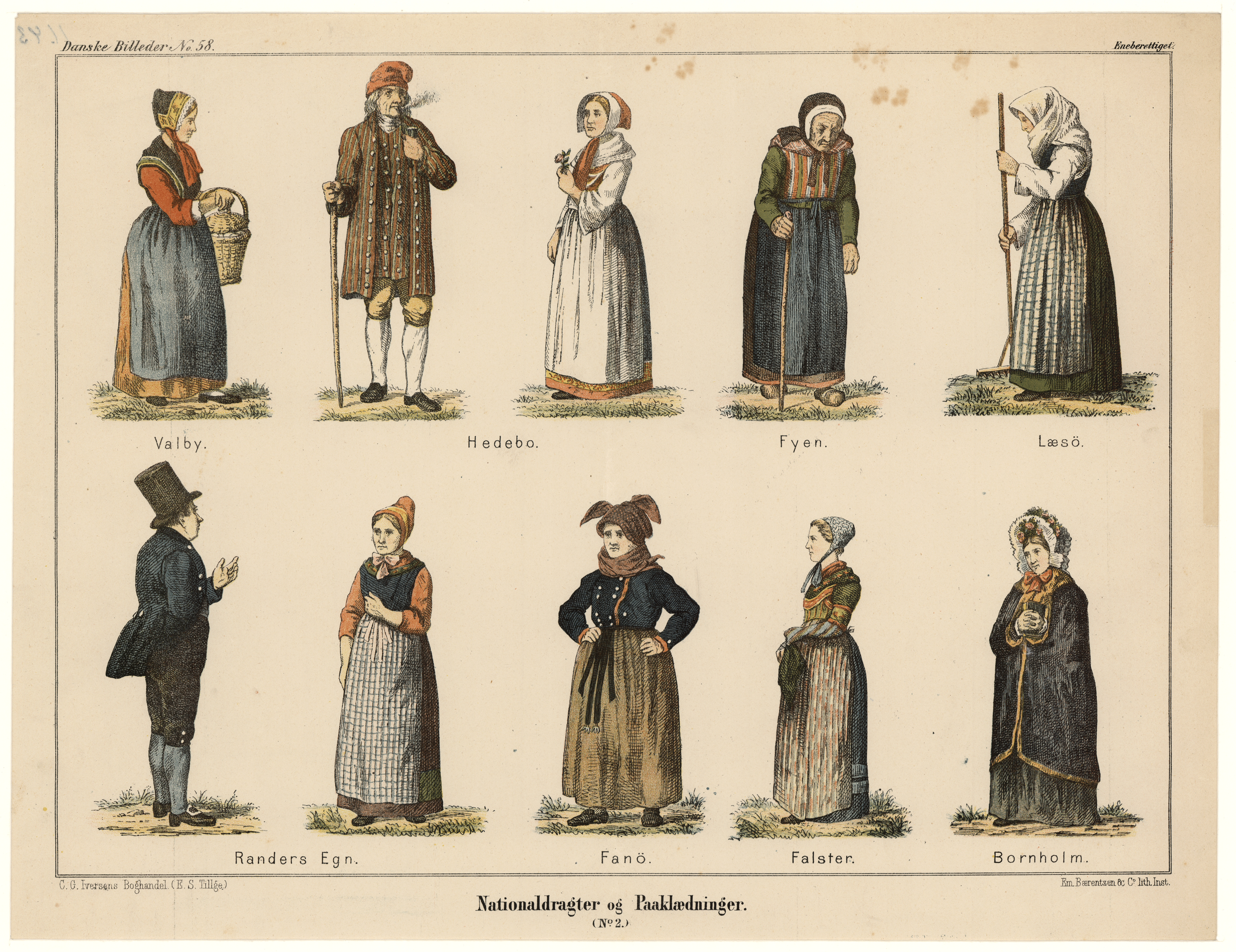 Nr. 58: Nationaldragter og påklædninger Papir med farvelitogaafi. Øverst til venstre: Danske Billeder No. 58. Øverst til højre: Eneberettiget. Nederst til venstre: C.G. Iversens Boghandel (E.S. Tillge). Nederst midtfor: Nationaldragter og Paaklædninger. (No.2.) Nederst til højre: Em. Bærentzen & Co. lith. Inst. Samlingen omfatter 63 billeder, mus.nr. 11.395-11.456 og 42 dubletter. Nr. 11.396-11.444 udgør 1. række, ifølge Julien Johansen: Nogle Anskuelsesbilleders Historie, 1907-11, dateret til 1863.